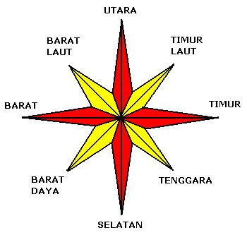 Made by User:Borgx for Indonesian Wikipedia using Paint